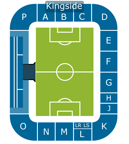 Willem II stadium